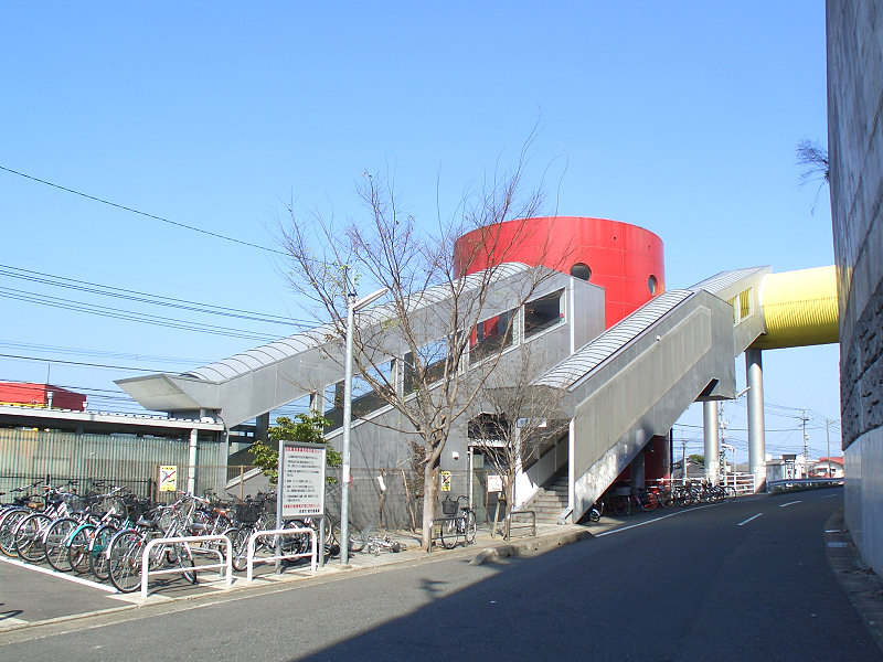 JR筑肥線美咲が丘駅 神在・荻ノ浦口 写真手前方向に行き、右折して踏切を渡ると国道202号に出る 設計者: 青木茂 撮影者/著者/著作権保有者 : MK Products (本人がアップロード) 撮影日 : 2006/11/04 美咲が丘駅用にアップロードした画像です。良い画像があれば別の画像に変えてください。